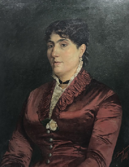 Ritratto di signora, olio su tela, 70 x 56 cm., firmato, coll. privata